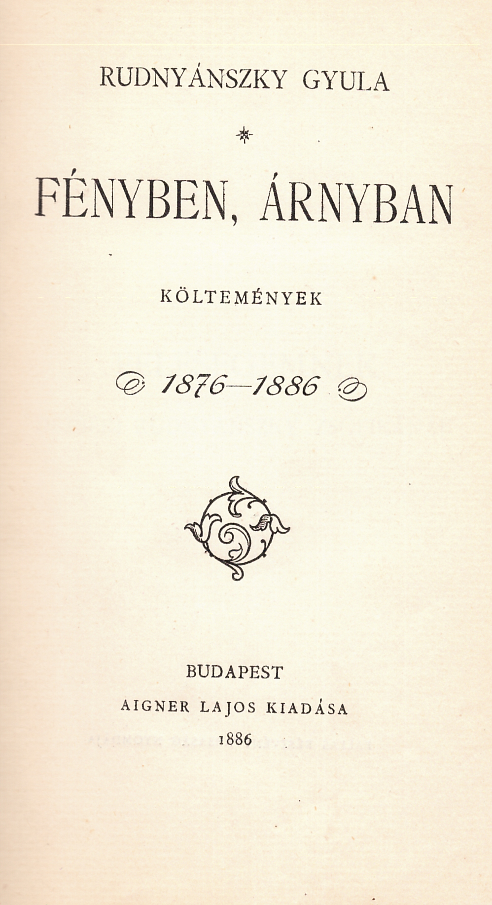 Rudnyánszky Gyula (1858-1913): Fényben árnyban (1886) - címlap